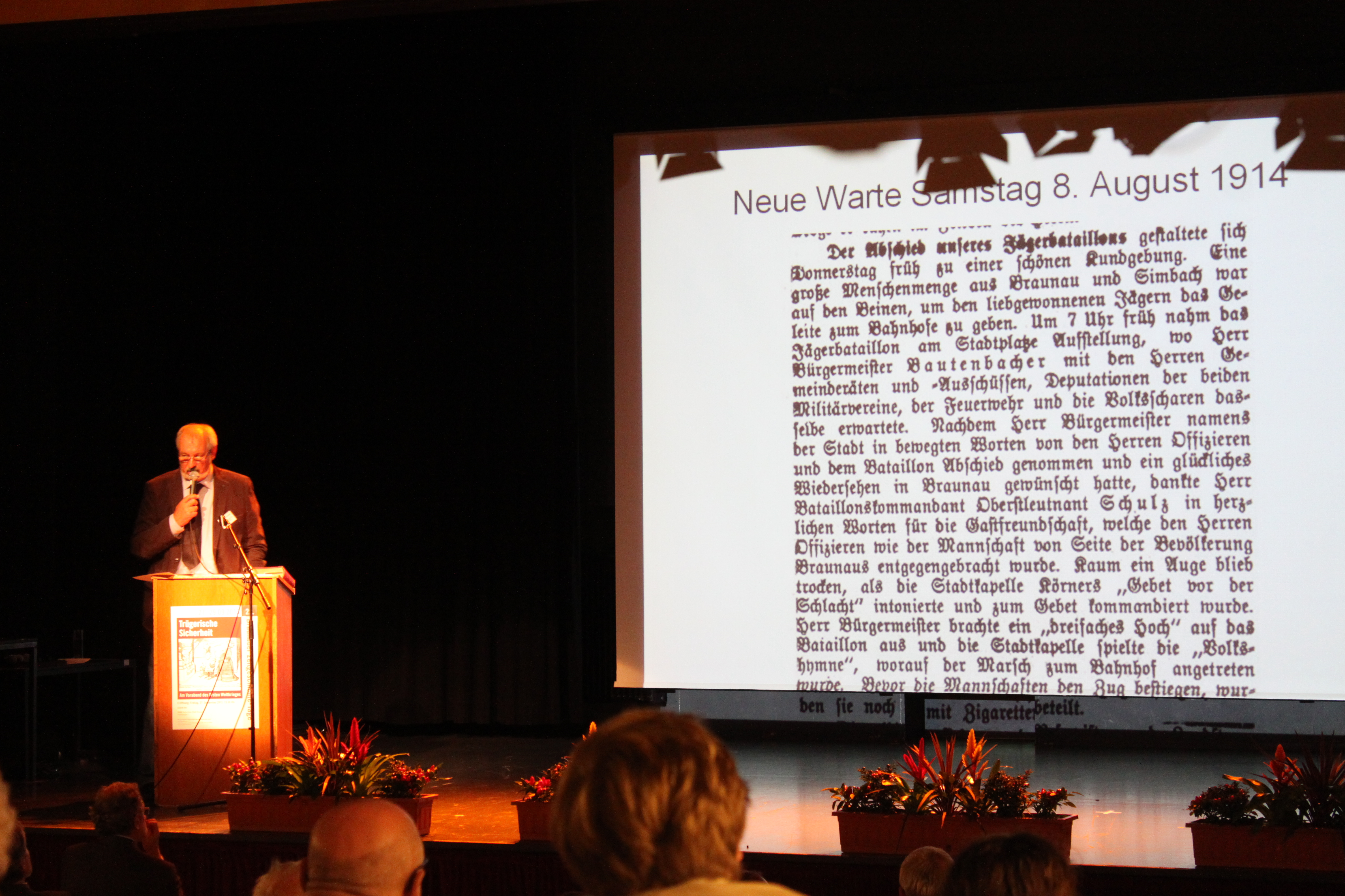 Florian Kotanko: Die Garnison Braunau als Mosaikstein in den Kriegsvorbereitungen der Habsburgermonarchie: Neue Warte: Samstag 8. August 1914